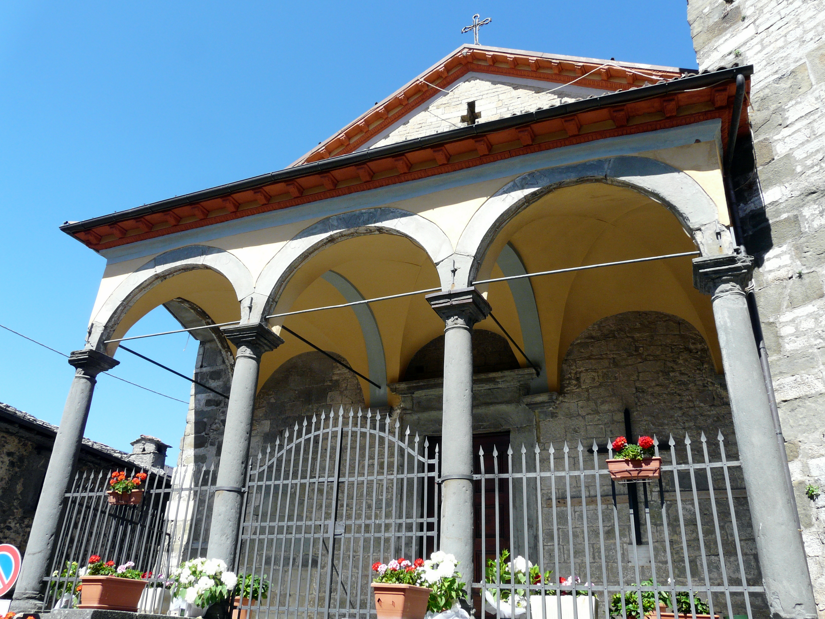 Facciata della pieve di San Pietro Porta, Careggine, Toscana, Italia